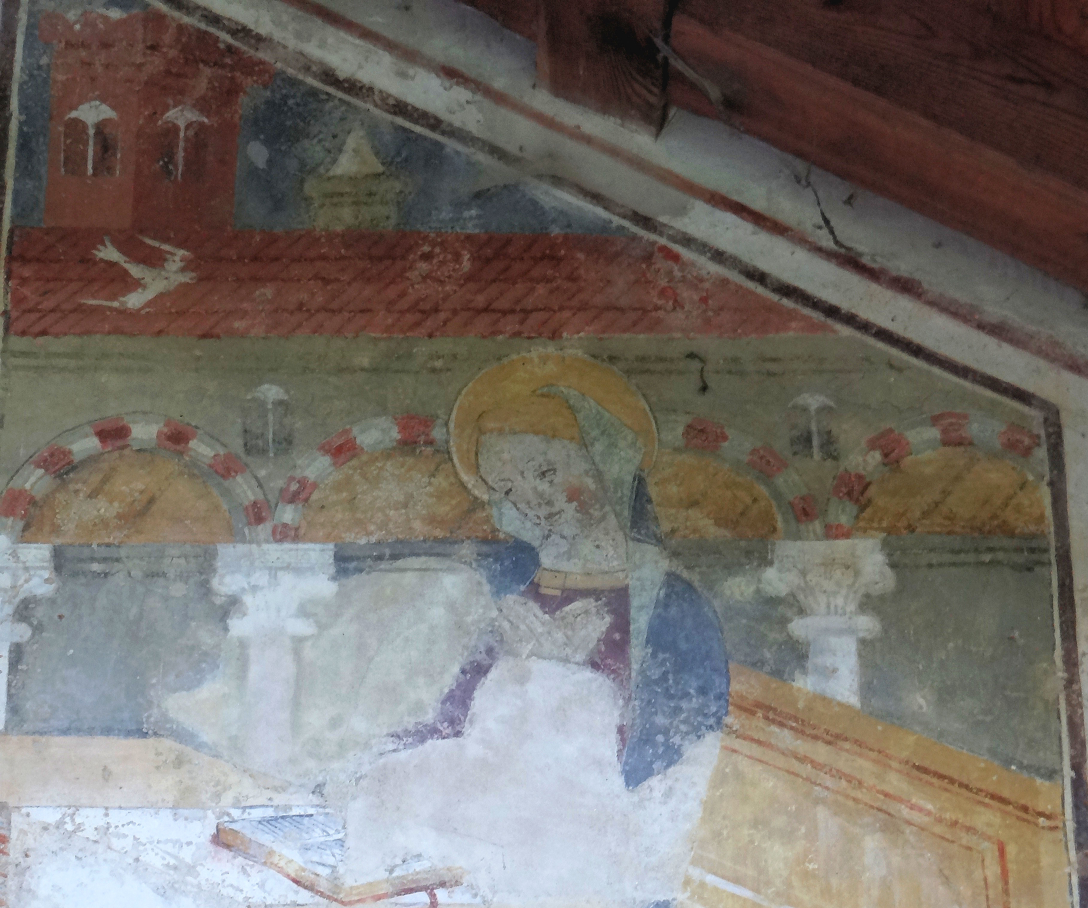 Saorge - Église de la Madone del Poggio - Portail est : Madone